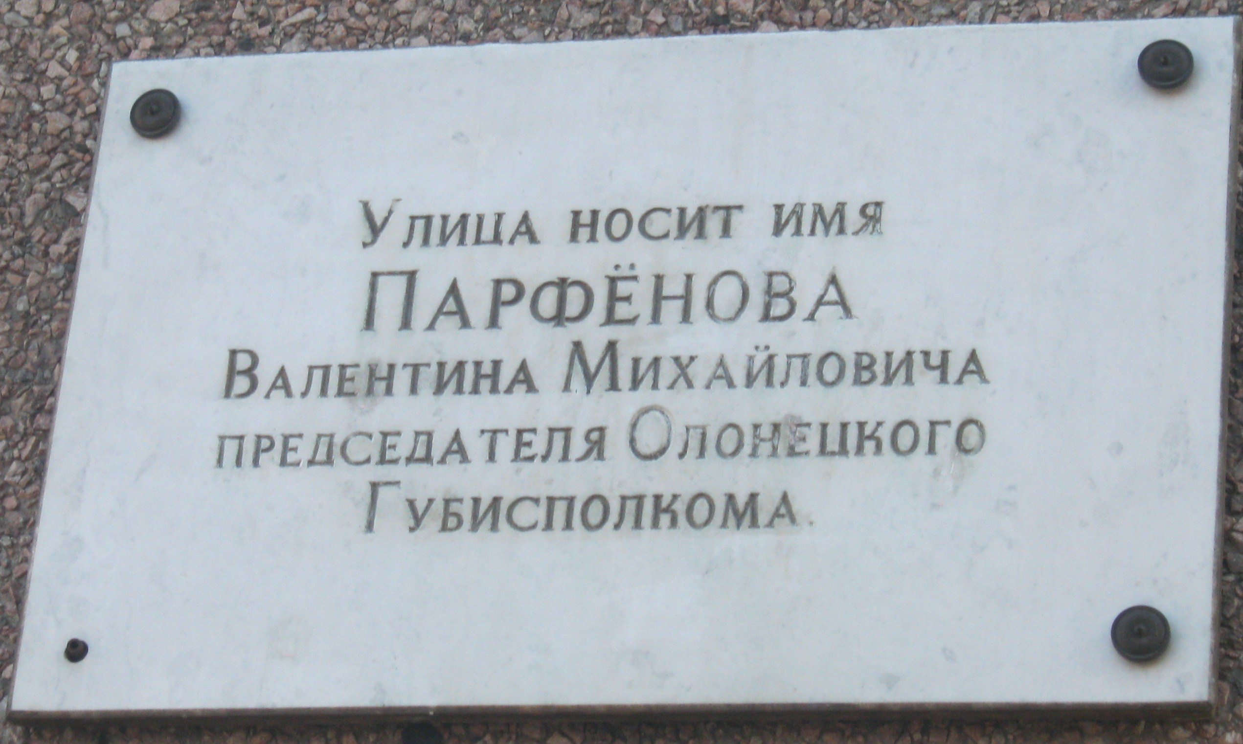 Мемориальная доска в Петрозаводске